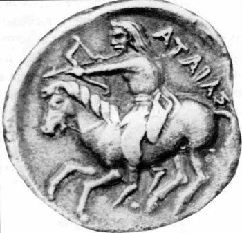 Скифская монета с изображением царя Атея